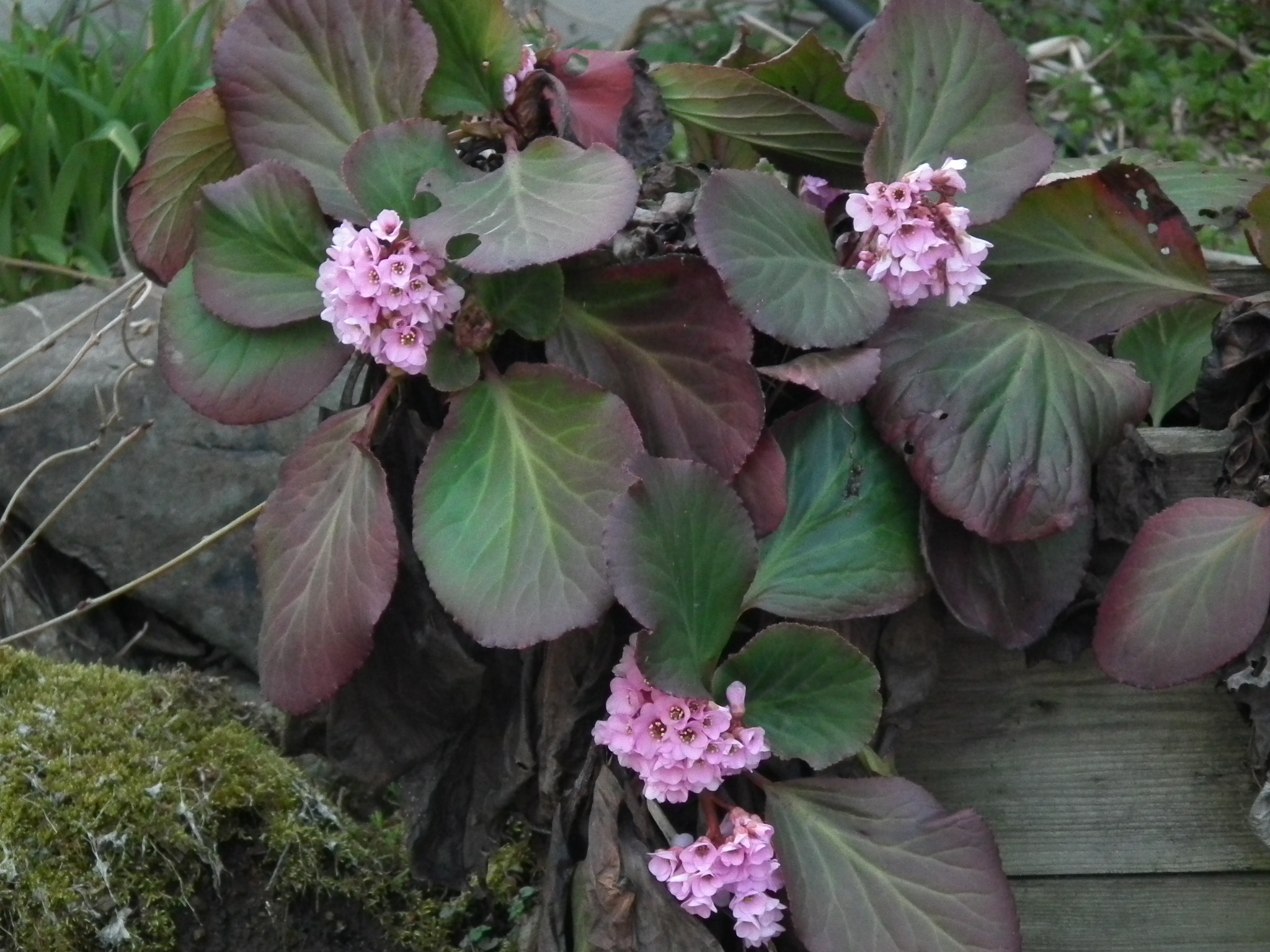 ヒマラヤユキノシタ（Bergenia stracheyi）はユキノシタ科ベルゲニア属の植物